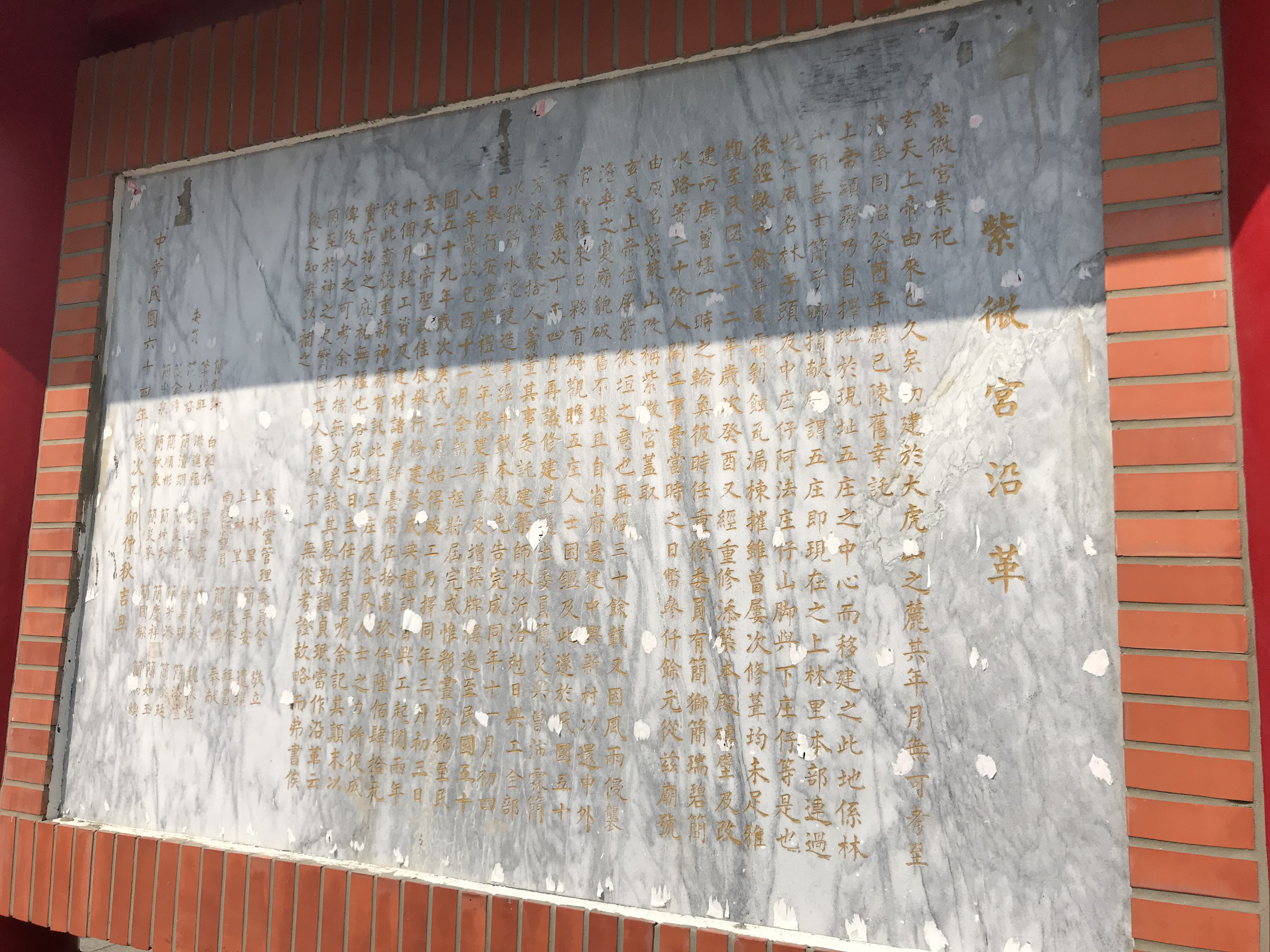 草屯紫微宮沿革